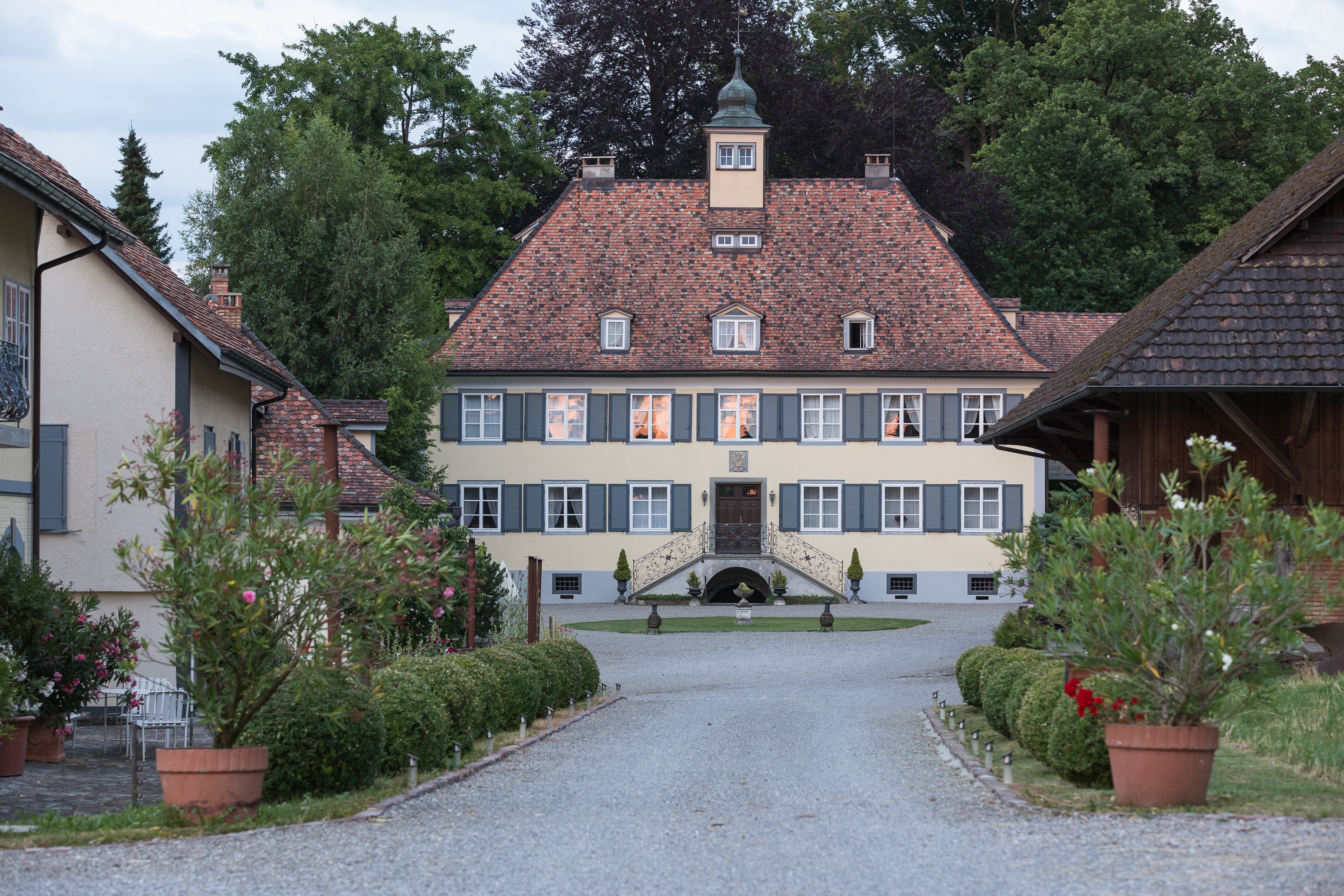 Schloss Girsberg